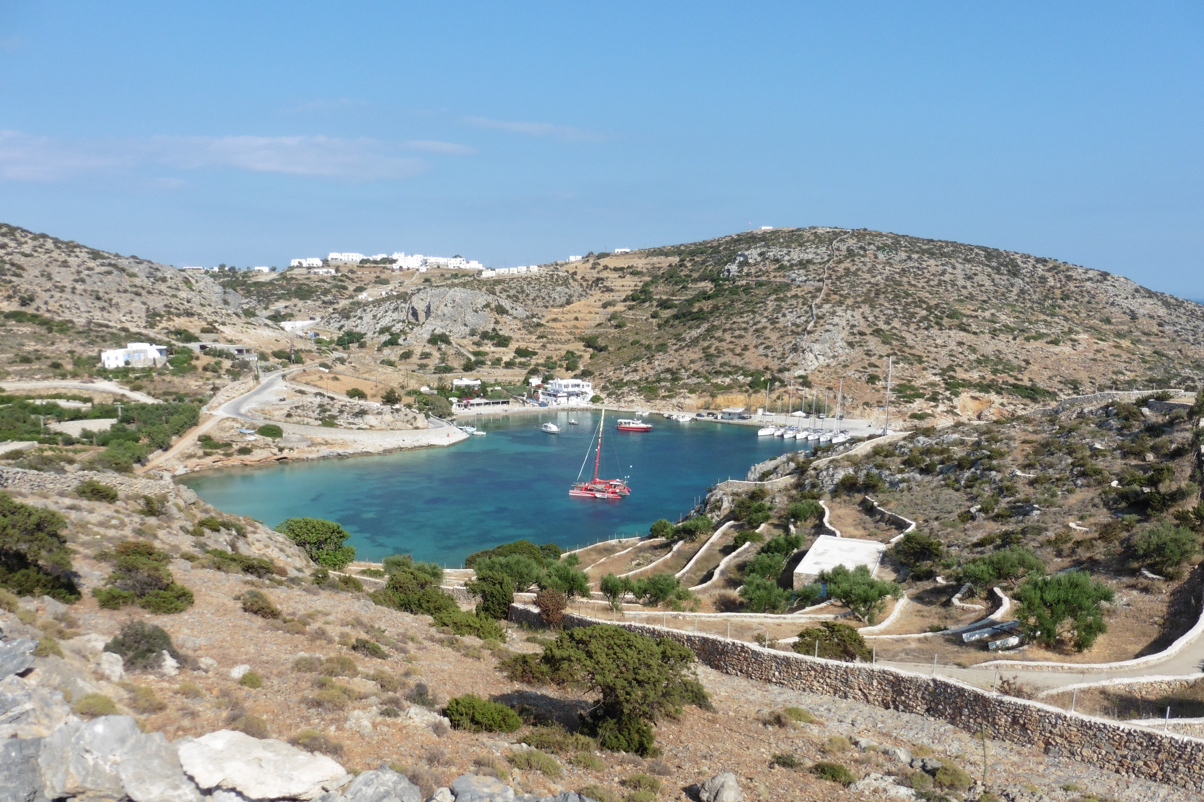 Hafenort Mersini, Schinoussa